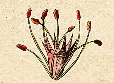 Ausschnitt (Klasse IX) aus Ehrets Tafel "Methodus Plantarum Sexualis"